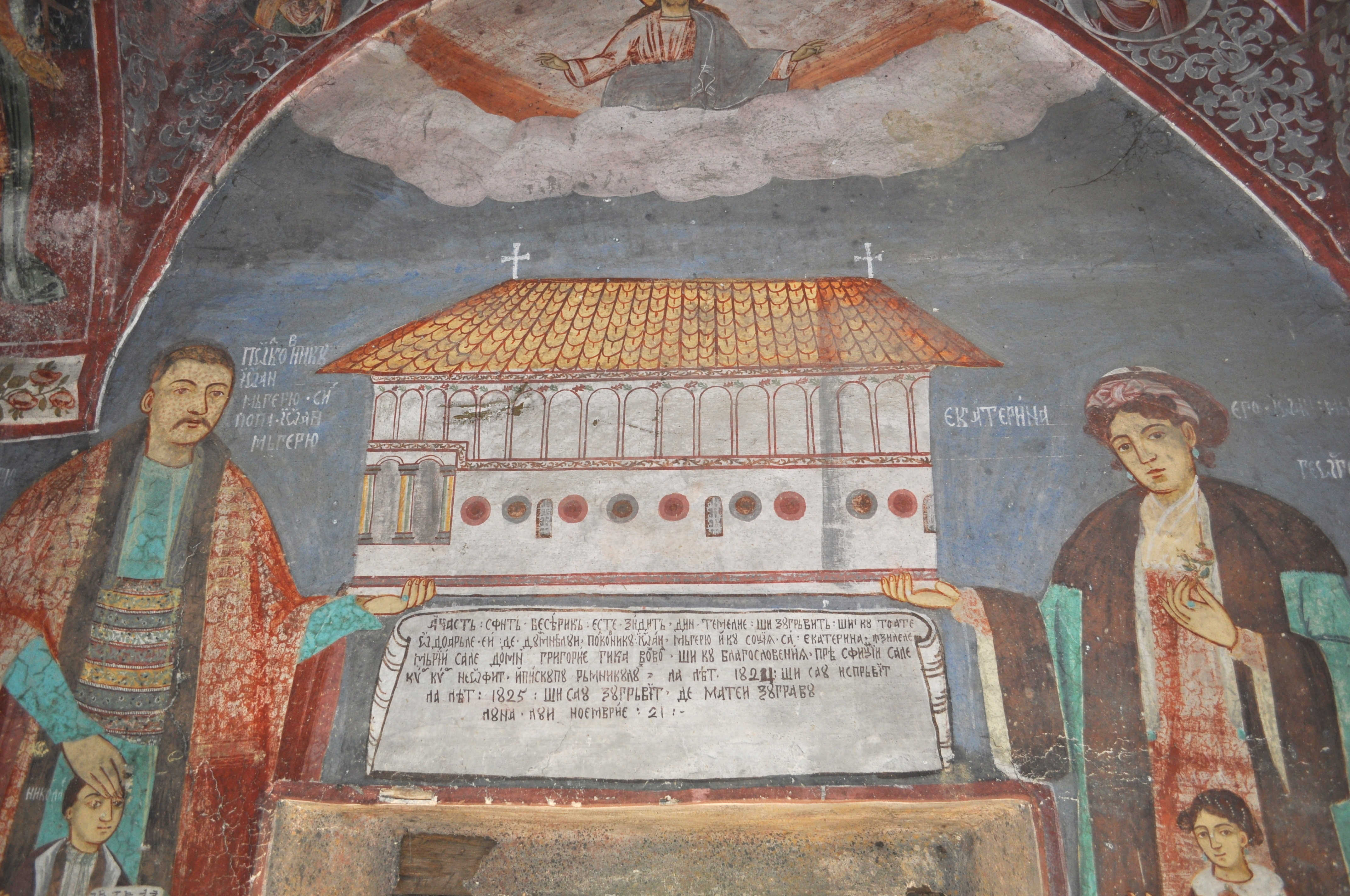 Biserica „Sf. Ioan, Sf. Nicolae și Sf. Gheorghe”, sat Cojani, oraș Târgu Cărbunești